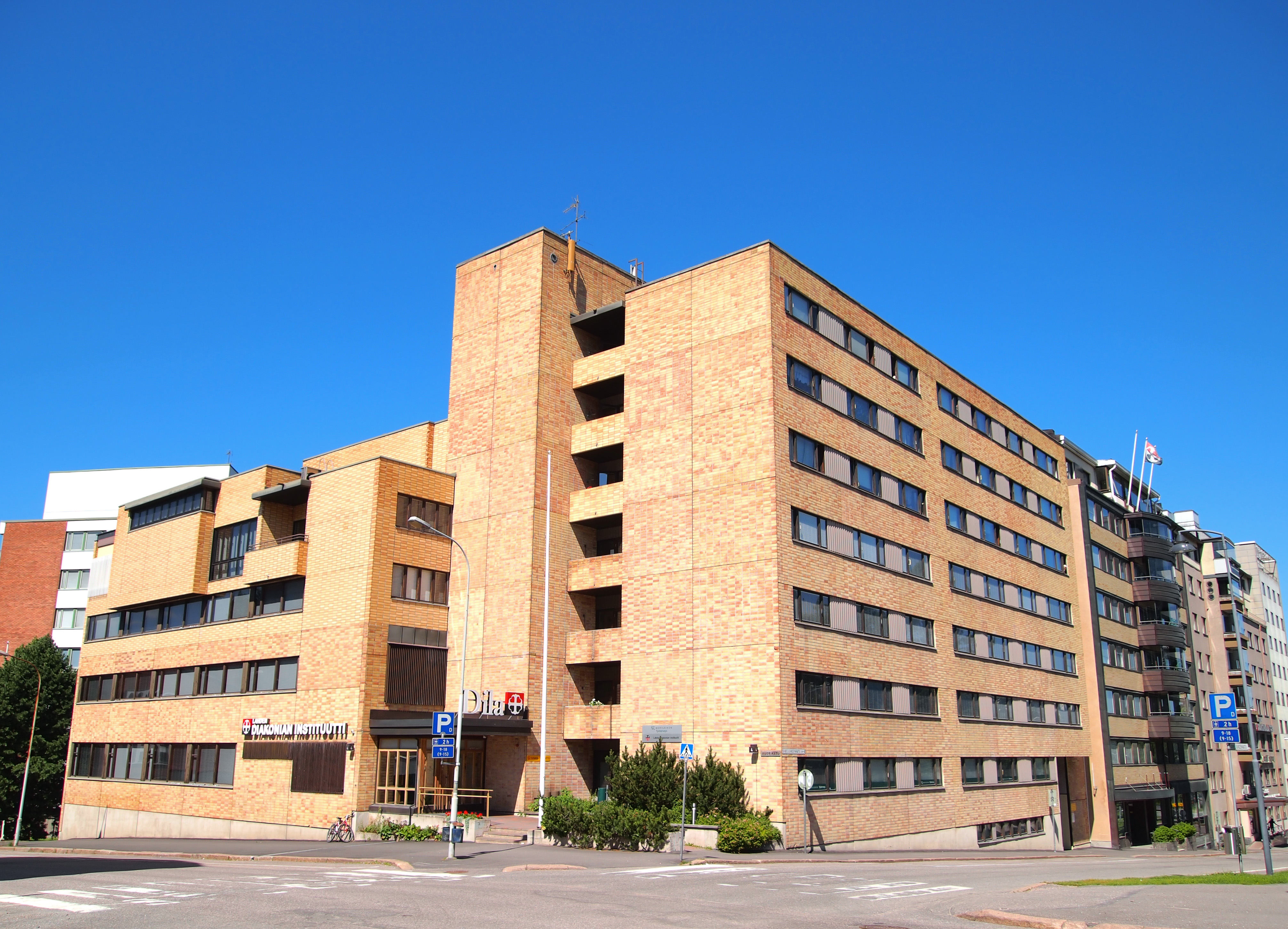 Lahden Diakonian instituutti This photograph was taken with an Olympus E-PL1.